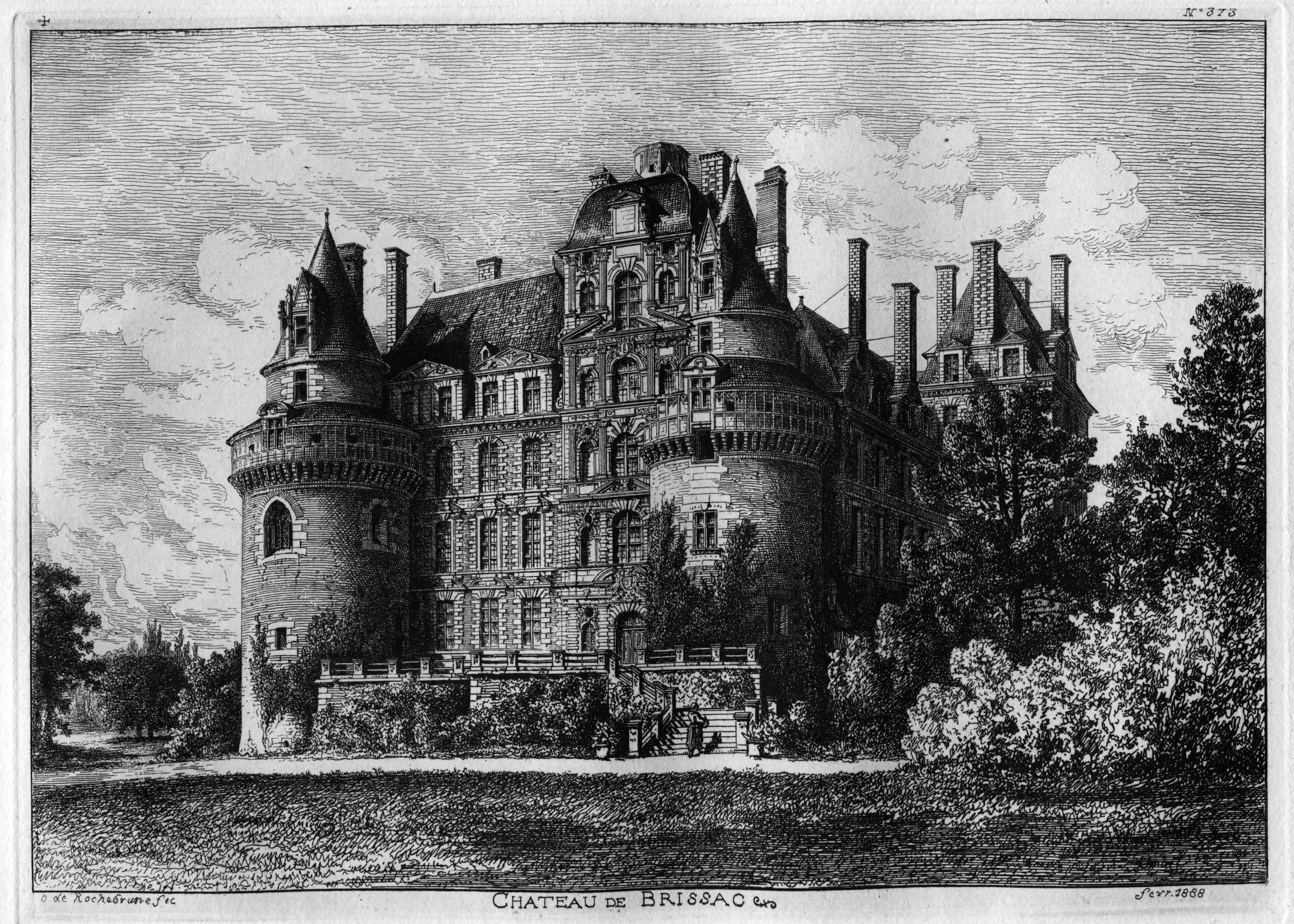 Gravure de Octave de Rochebrune , à l'acide (eau-forte) sur cuivre Château de Brissac